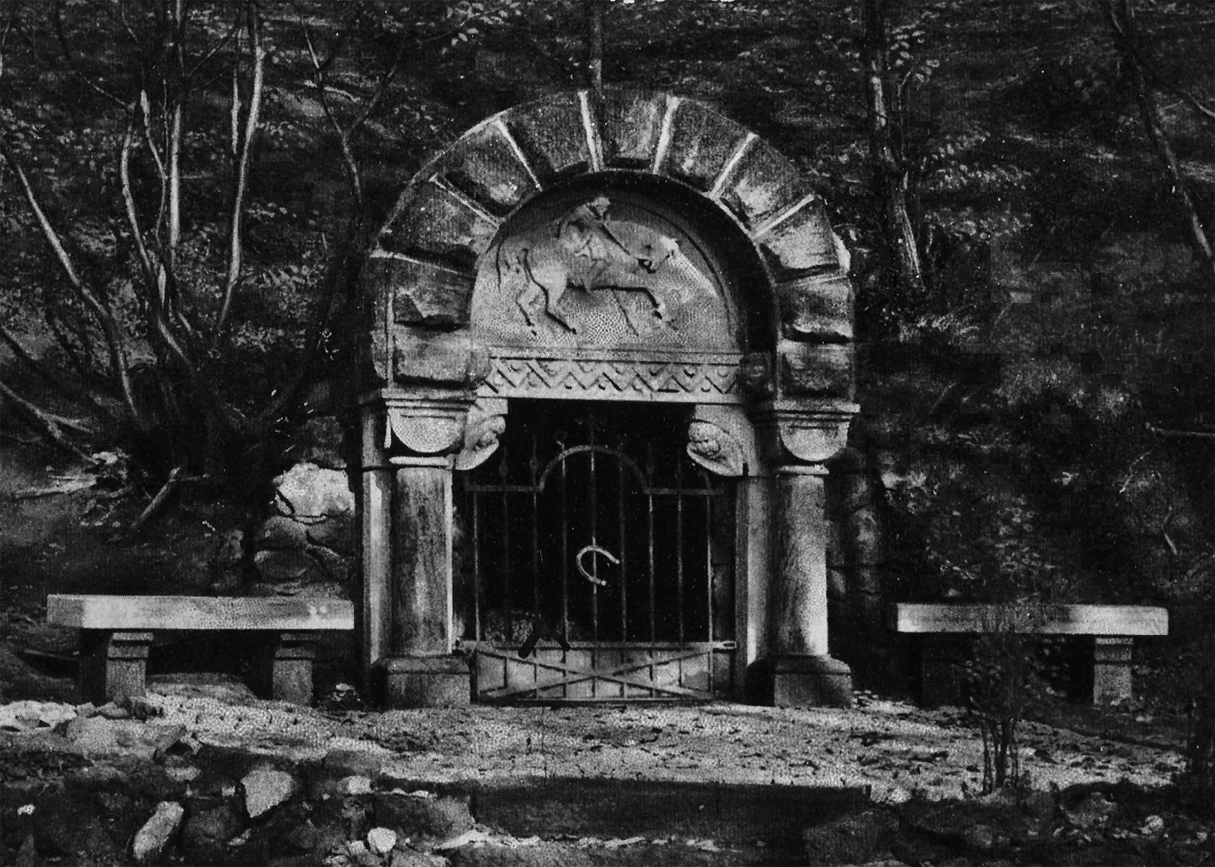 Die Wittekindsquelle auf dem Wittekindsberg bei Porta Westfalica (Postkarte um 1900)